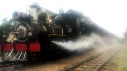 Locomotive Baldwin - bitola 76cm